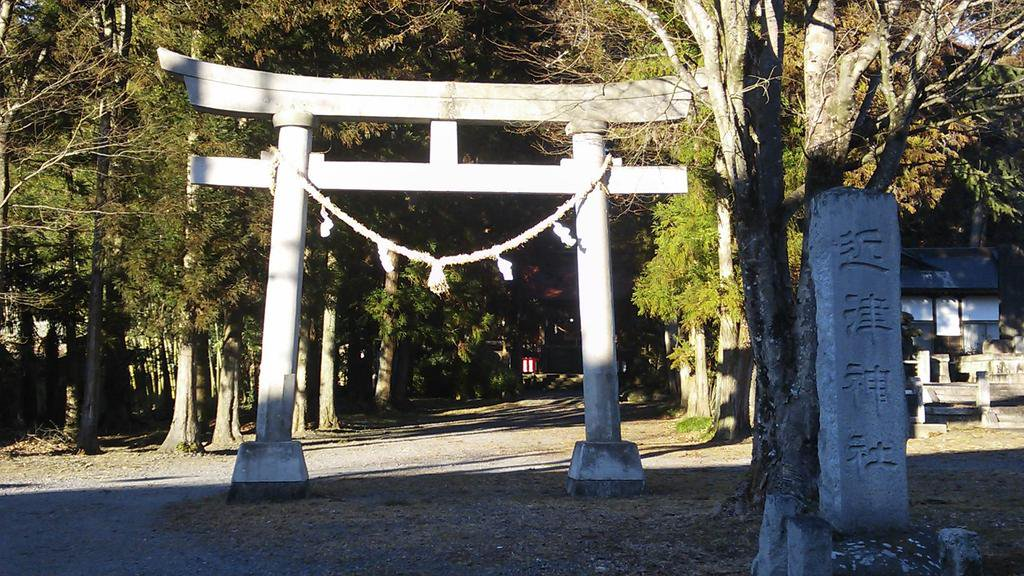 下野宮近津神社鳥居